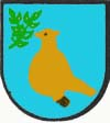 Herb wsi Hucisko (gmina Stryszawa)